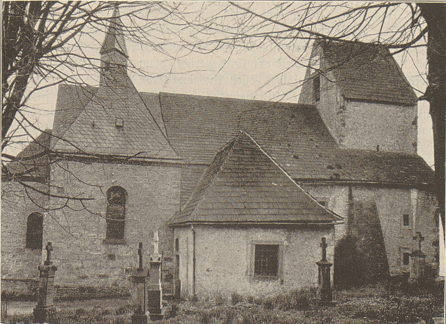 Kirche in Altenheerse